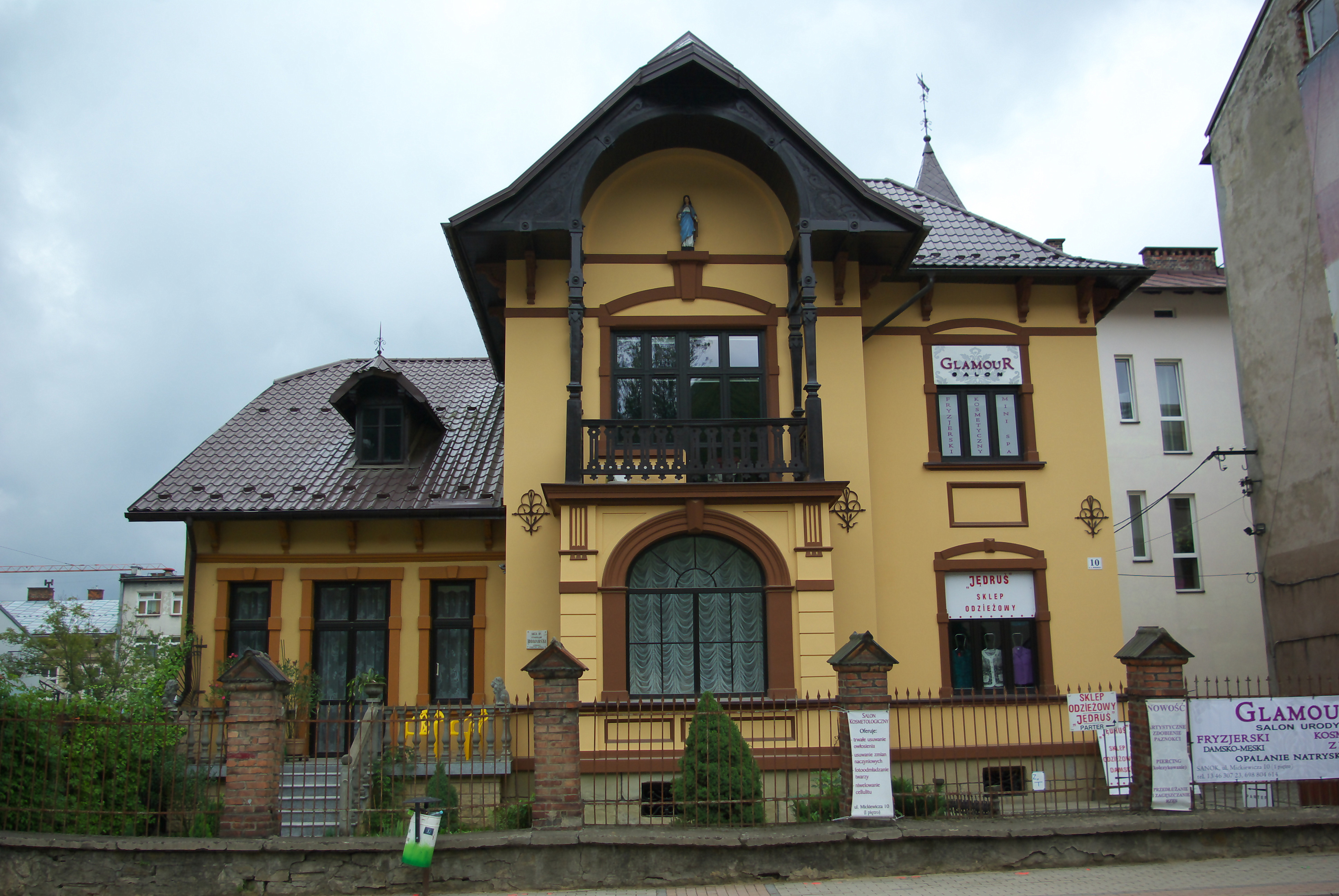 Willa draWilla dra Stanisława Domańskiego w Sanoku Stanisława Domańskiego w Sanoku